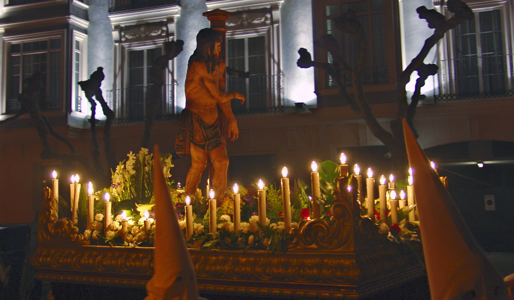 Semana Santa 2008, procesión del Santo Entierro, réplica de la escultura de Jesús Atado a la Columna, cuyo original se conserva en el museo catedralicio, Burgos (España).